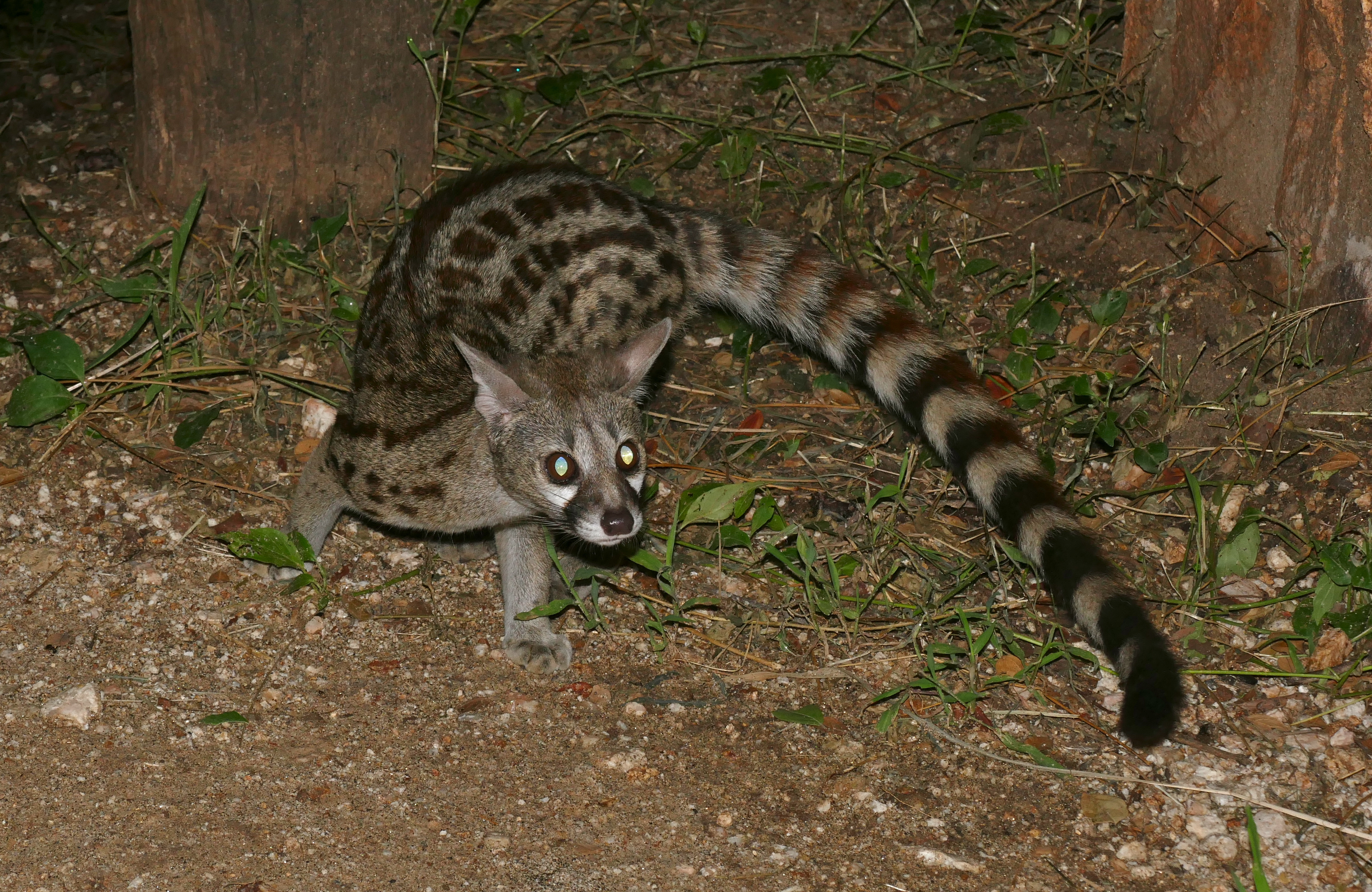 Tamboti Camp, Kruger NP, SOUTH AFRICA